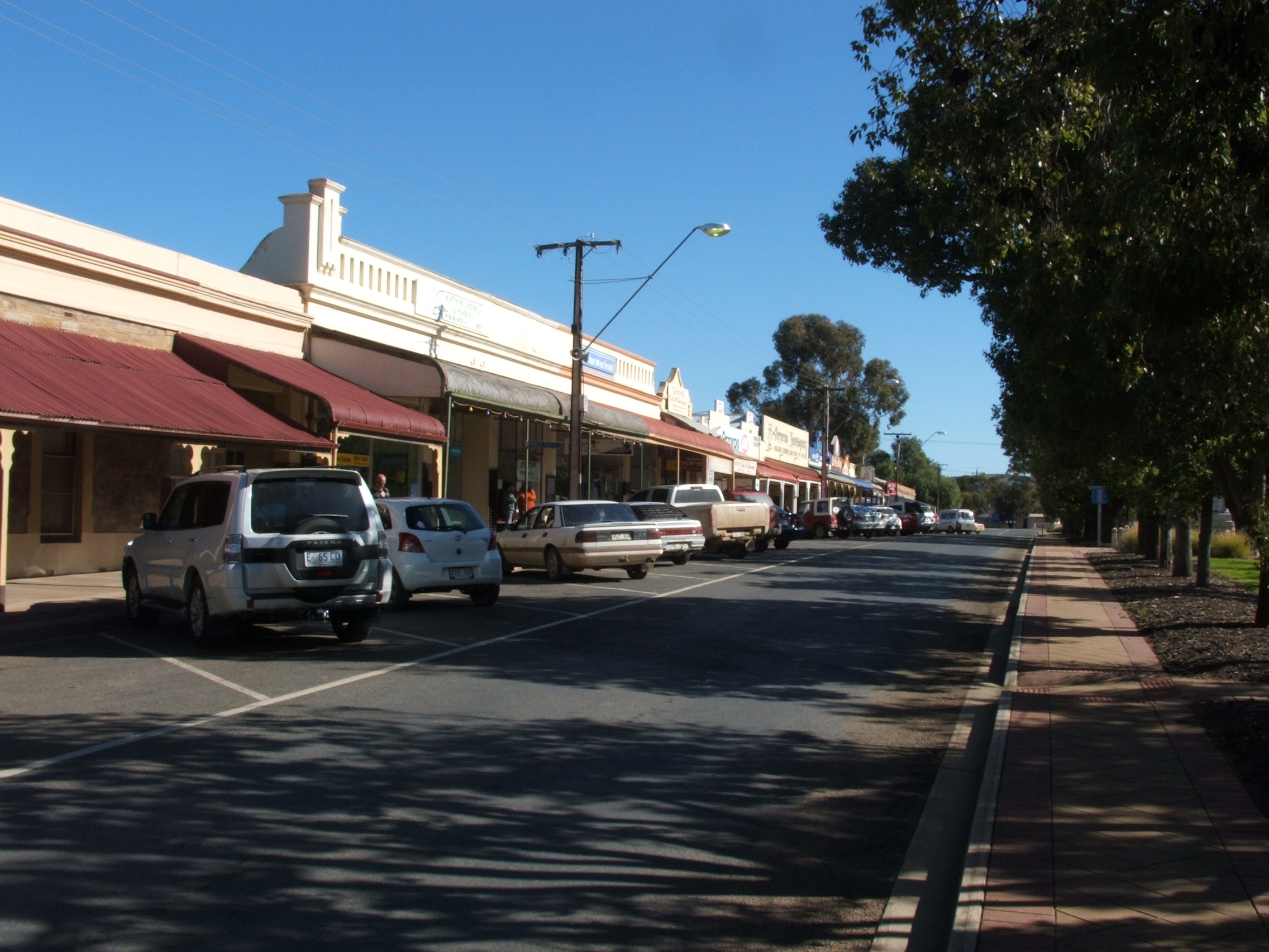 Orroroo (20)